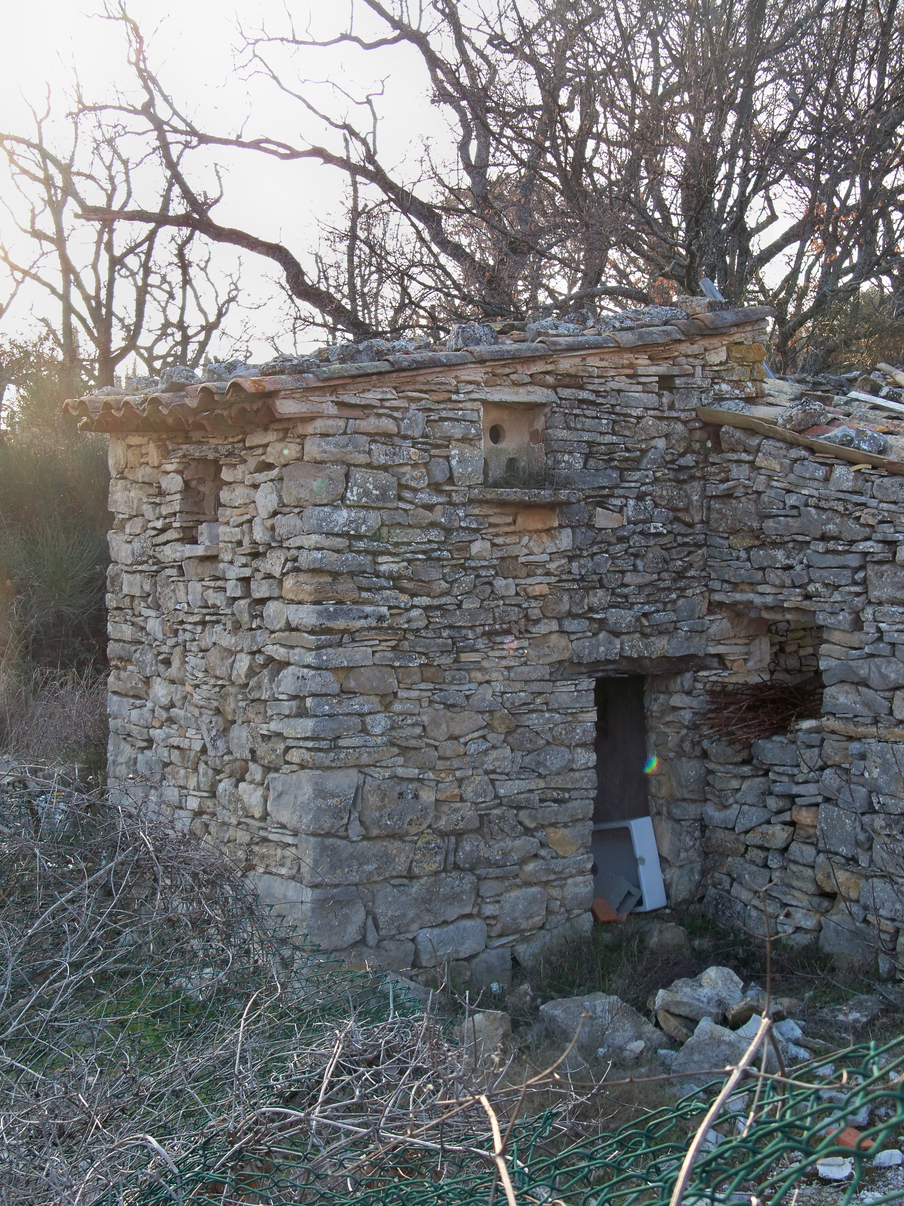 Pigeonnier à Apt